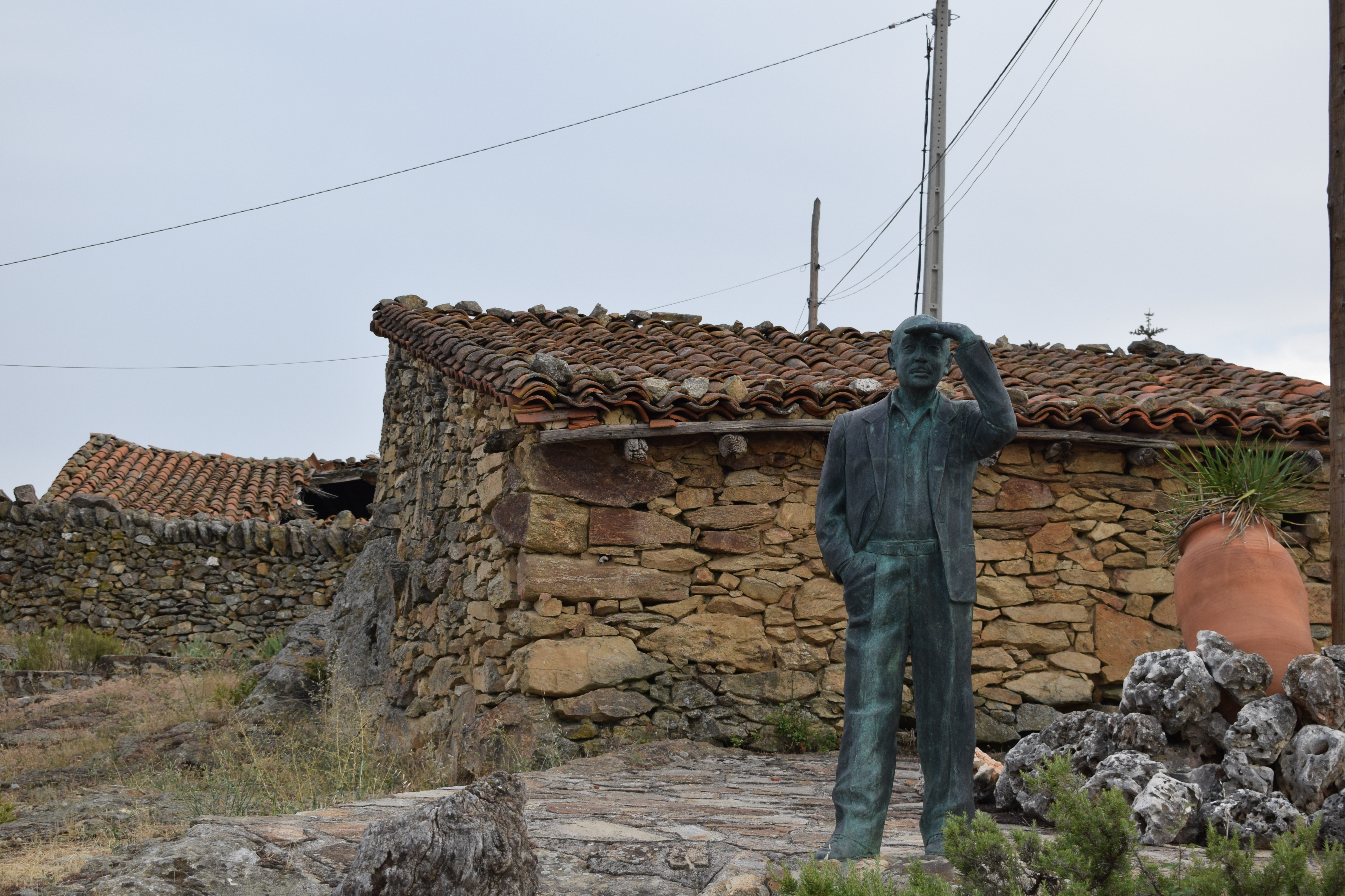 Mirador de La Peñota, de El Cuadron (Madrid)